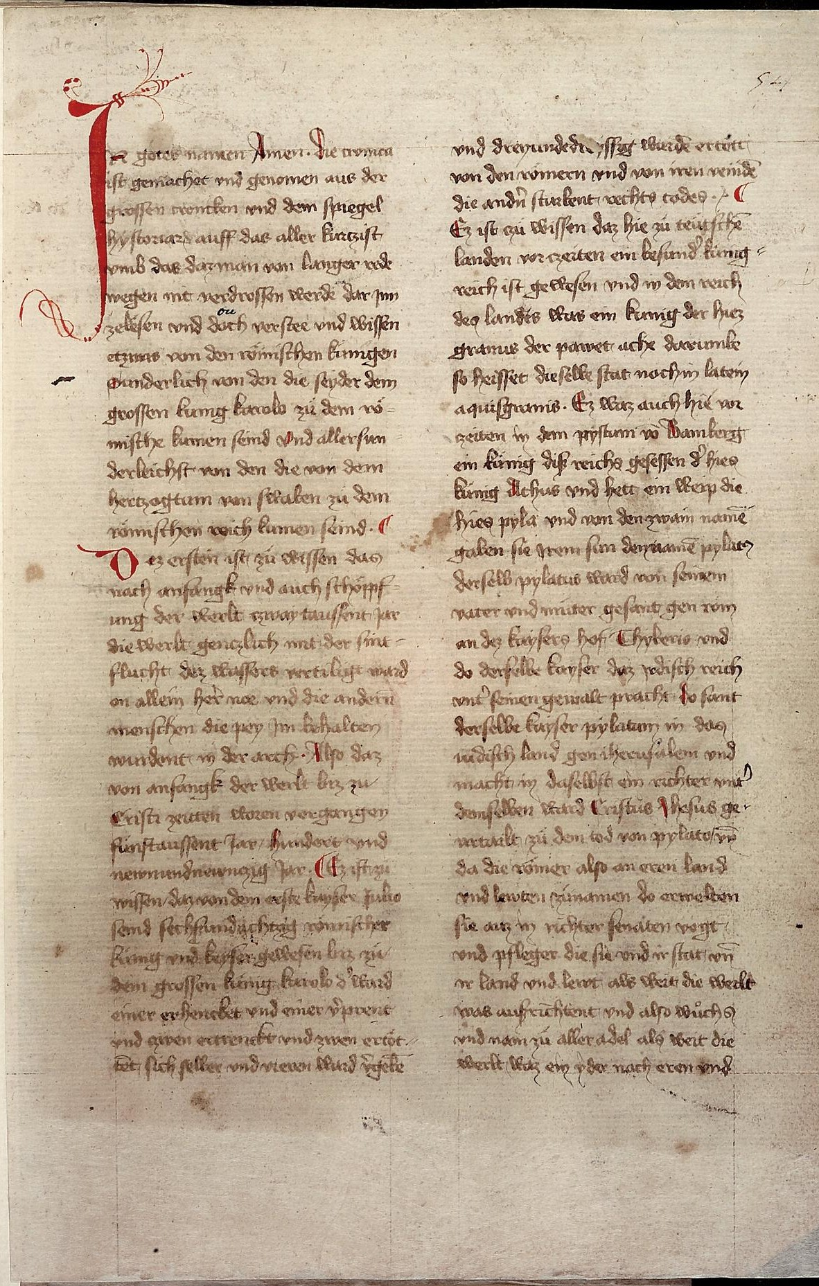 Codex Palatinus germanicus 5, Blatt 54r der Handschrift: "Gmünder Chronik" (Anfang)